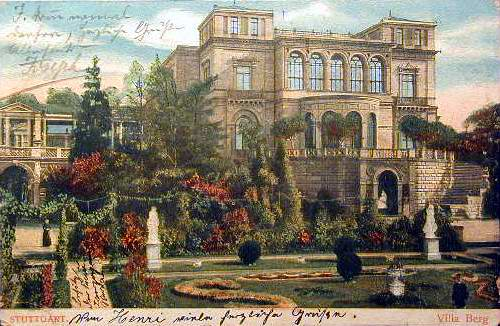 Stuttgart, Villa Berg, Ansicht von Westen mit dem Nordwestflügel, Postkarte, um 1910.